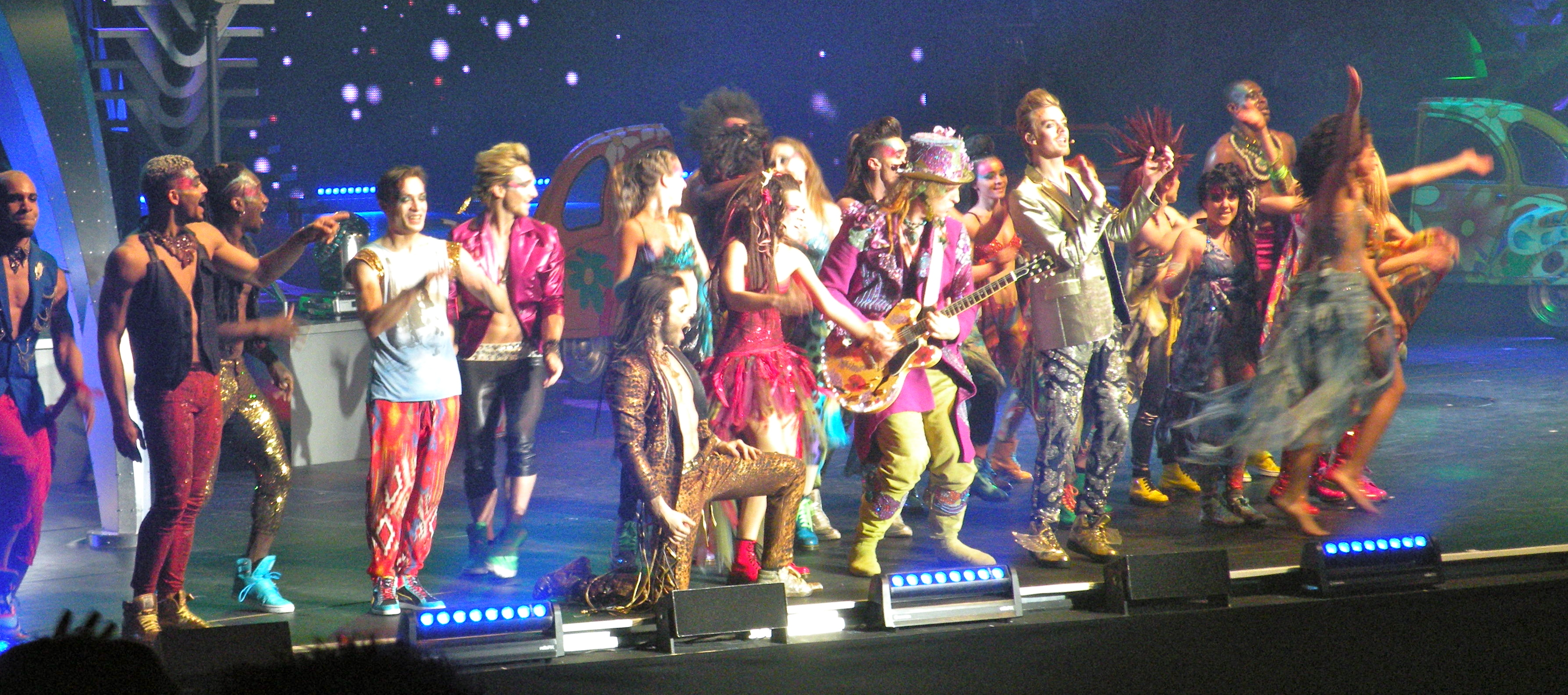 troupe d'adam et eve